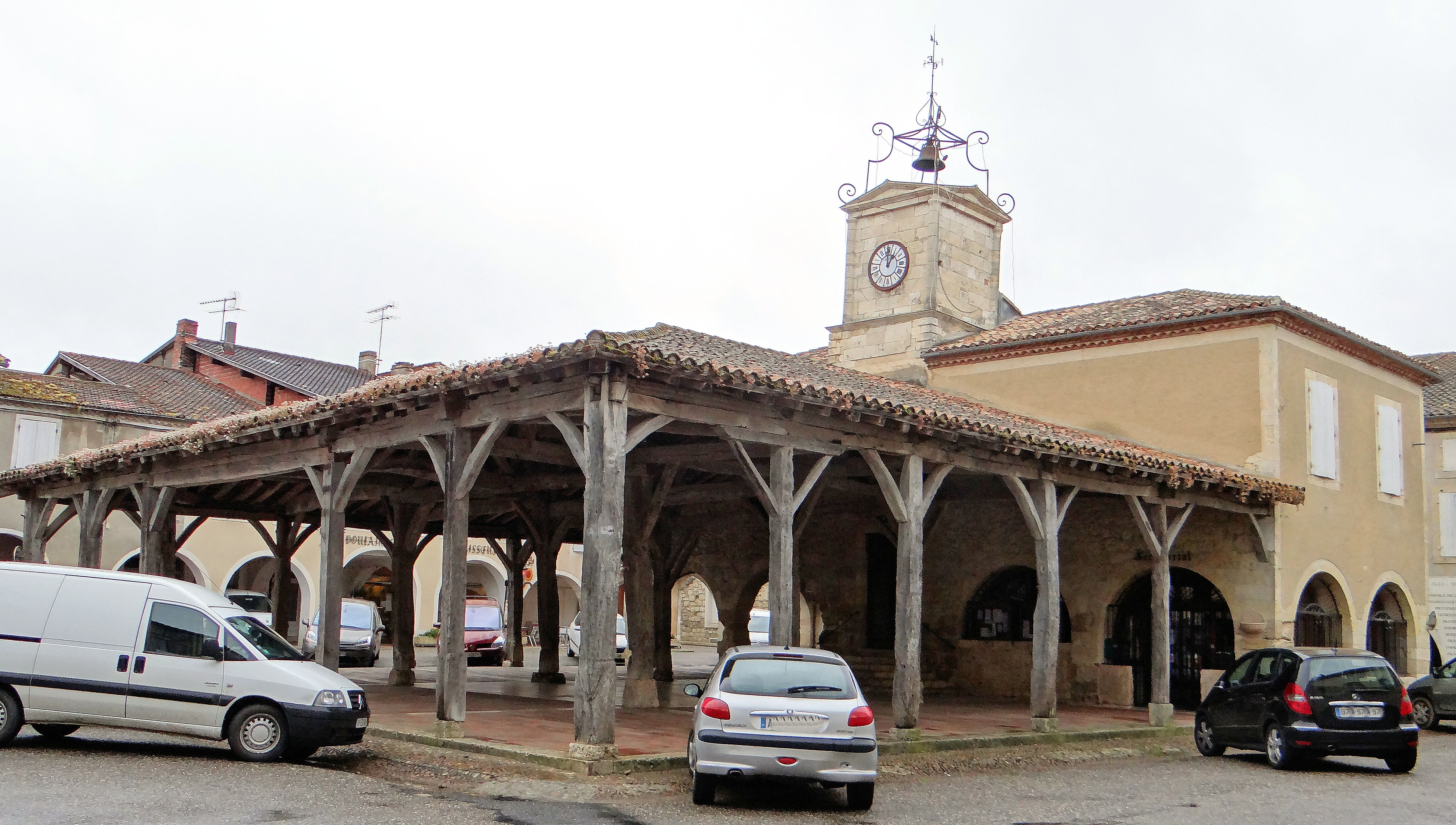 Saint-Clar - Halle-hôtel de ville